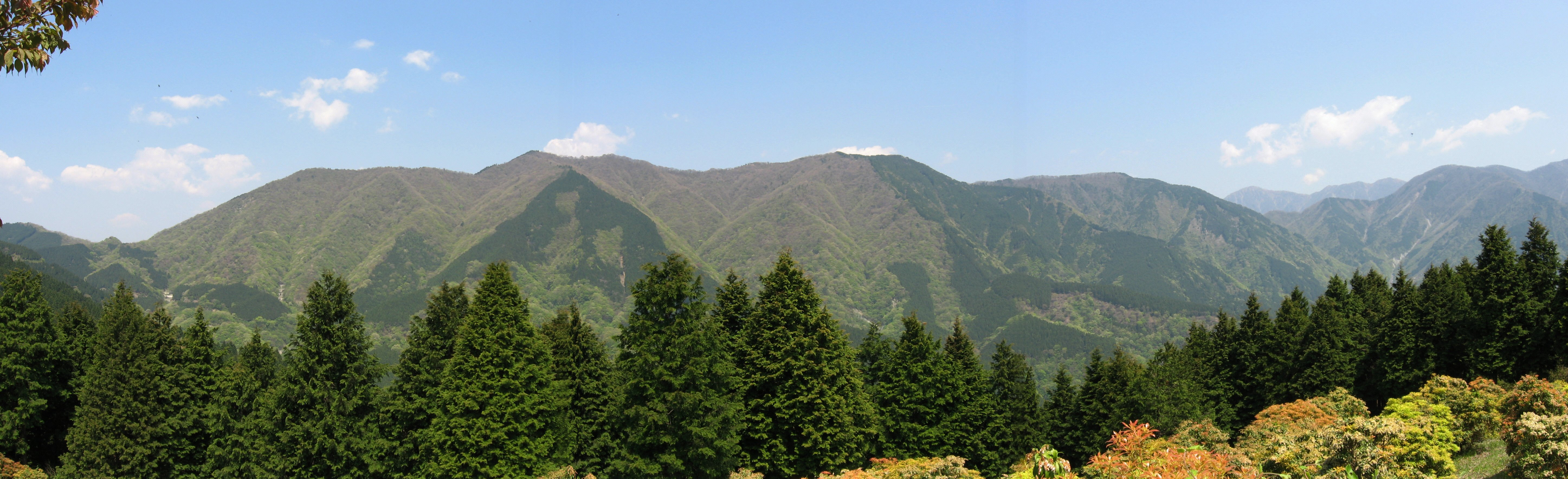 シダンゴ山より檜岳山稜 Chamaecyparis obtusa